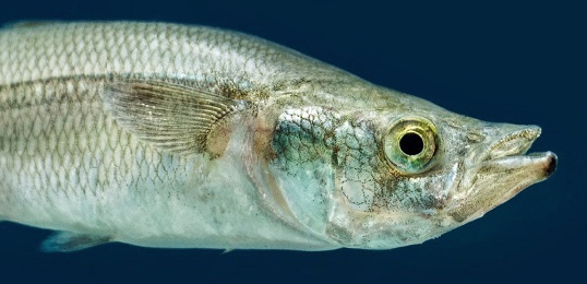 En el marco del Seminario Interdisciplinario de Alimentación del Instituto de Investigaciones Dr. José María Luis Mora (Instituto Mora), se presentó el libro El pescado blanco en la historia, la ciencia y la cultura michoacana, que aborda la importancia que ha tenido esta especie para el estado de Michoacán.